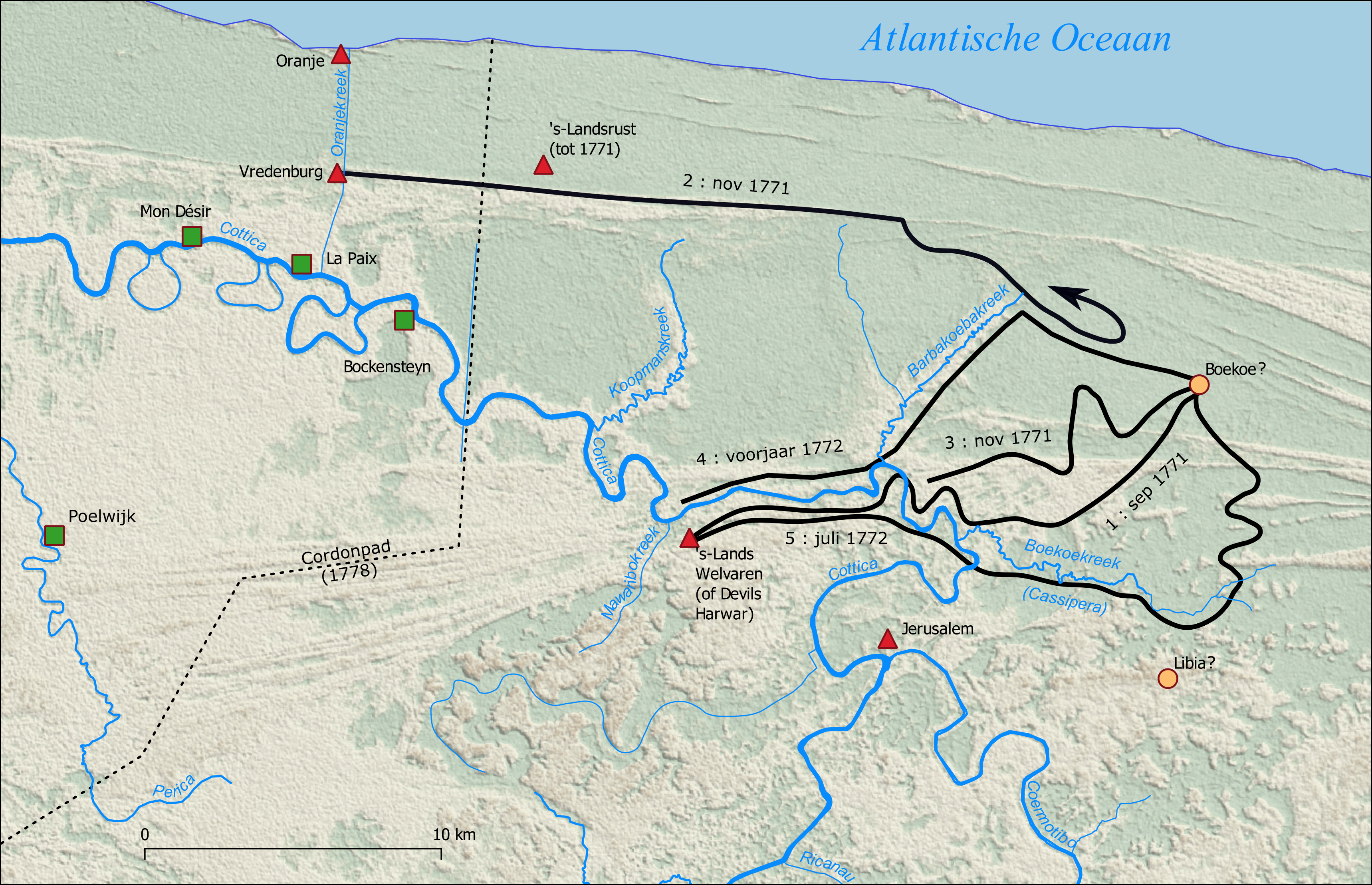 Strafexpedities naar Fort Boekoe in 1771-1772 in Suriname. This map may be incomplete, and may contain errors. Don't rely solely on it for navigation.